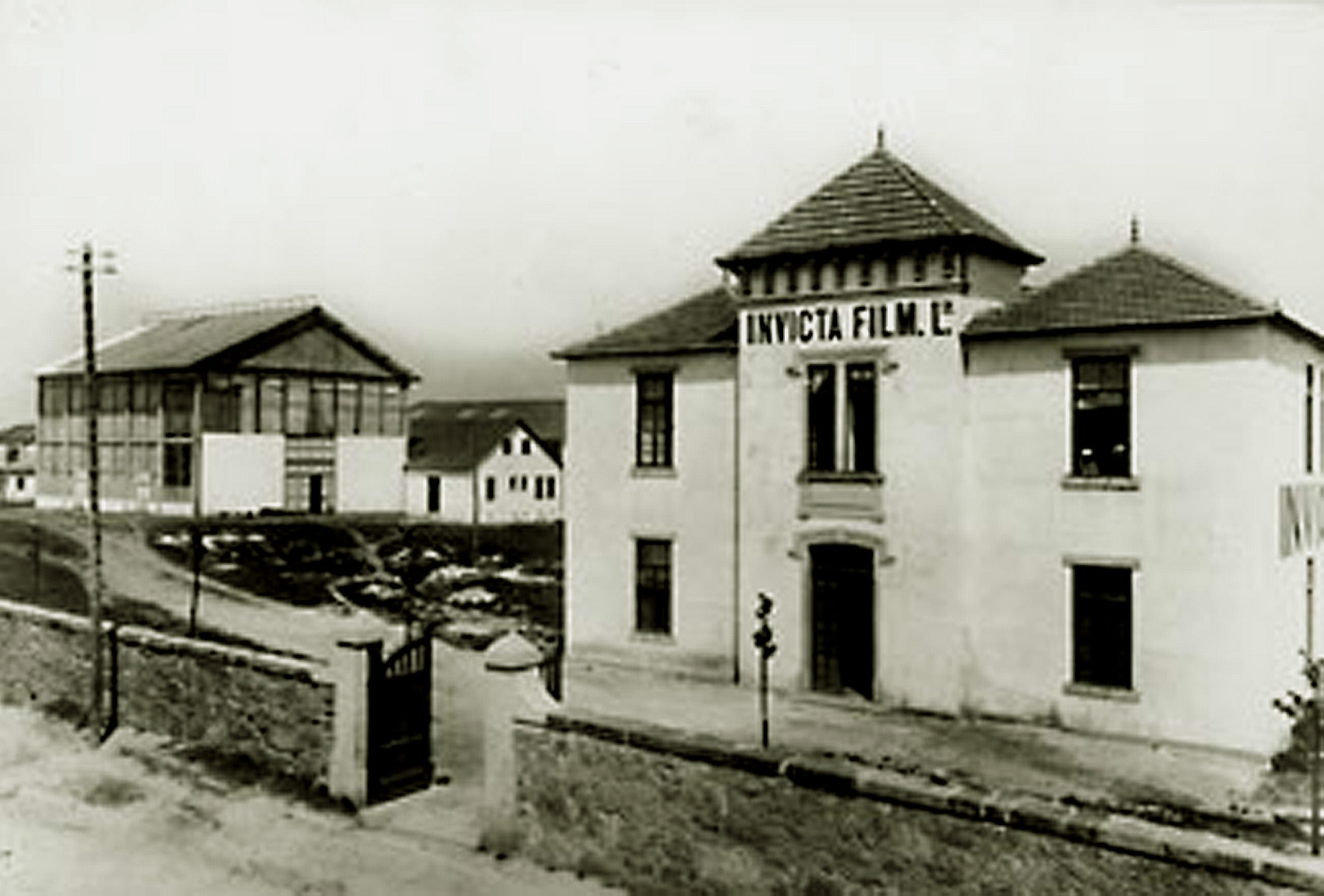 Invicta Film, Rua da Prelada (near Carvalhido), Ramalde, Porto, Portugal